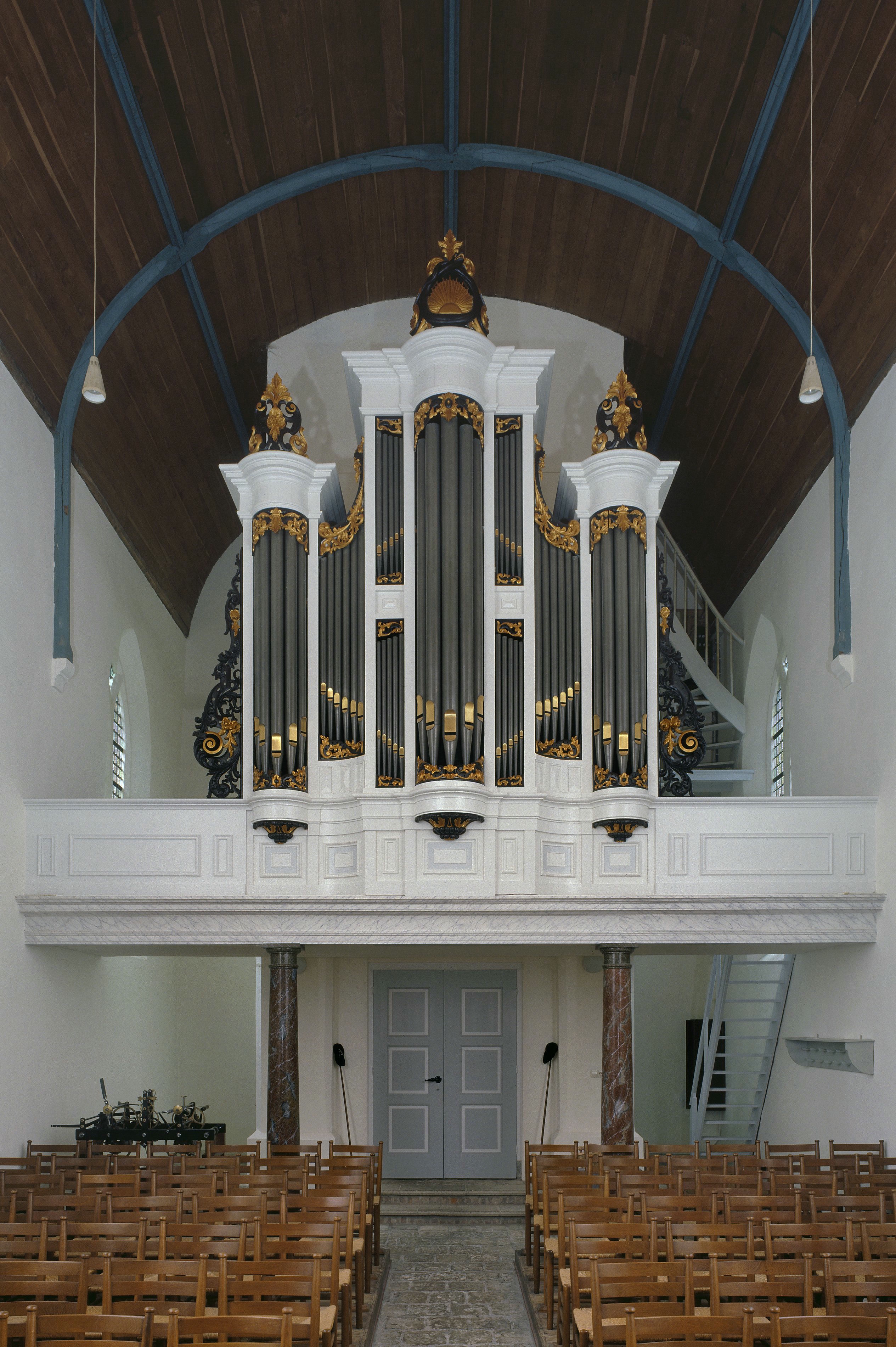 Zicht op een deel van het interieur van de Nederlands Hervormde Kerk gevestigd aan de Ring 1 in Noordgouwe: Interieur, aanzicht orgel, orgelnummer 1090 (opmerking: Gefotografeerd voor Het Historische Orgel in Nederland 1865-1872)